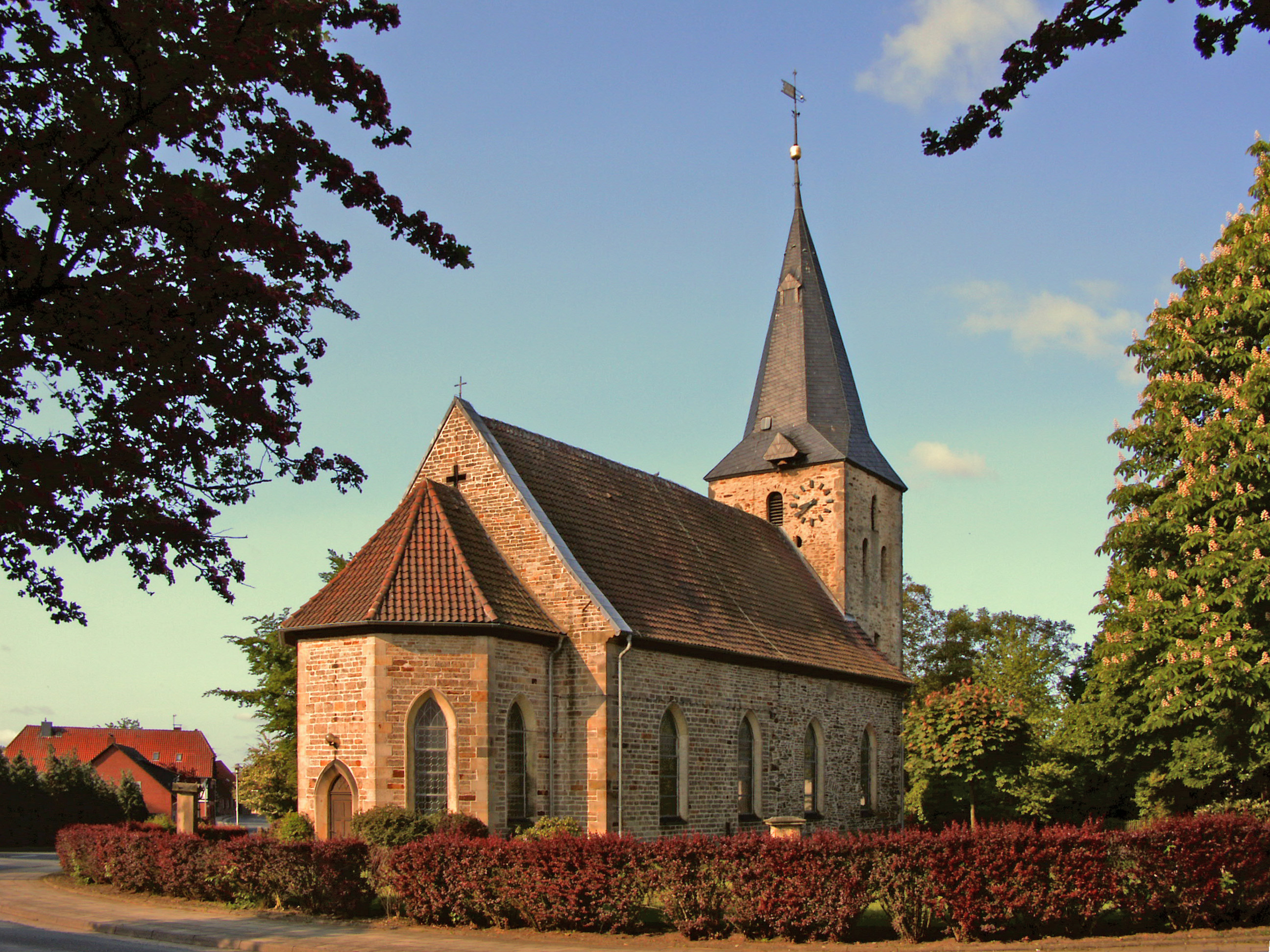 Evengelische St. Andreas-Kirche in Velpke, Landkreis Helmstedt.